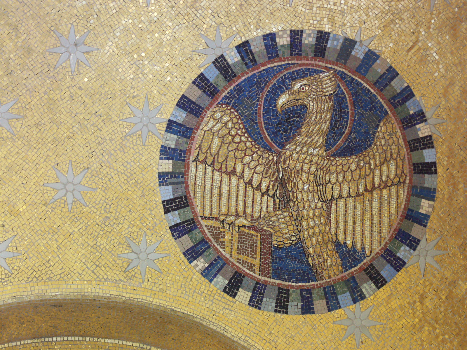 Mont Sainte-Odile, Alsace, France